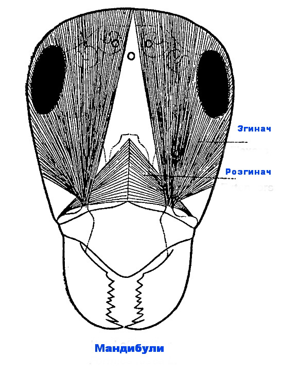 Схематичне зображення голови мурахи - похідний (derivate) від файла